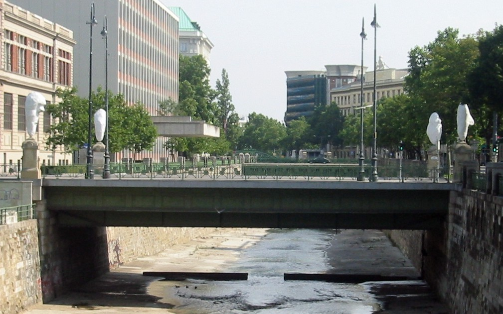 Wien, Stubenbrücke über den Wienfluss. An der linken Seite beginnt die Weiskirchnerstraße, rechts die Landstraßer Hauptstraße.